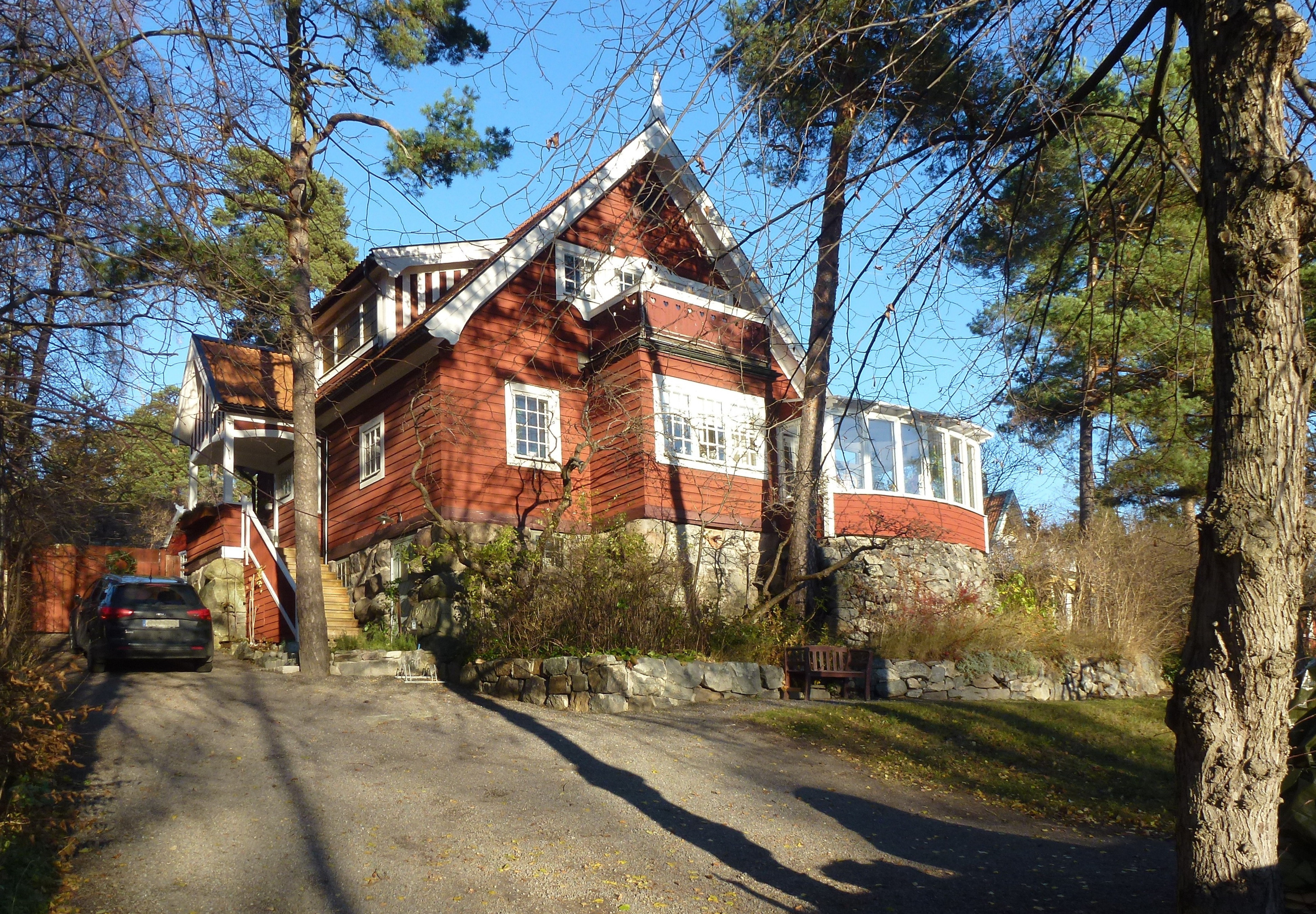 Villa Sandberg, Värmdövägen 209, arkitekt Gustaf Hugo Sandberg, den egna bostaden